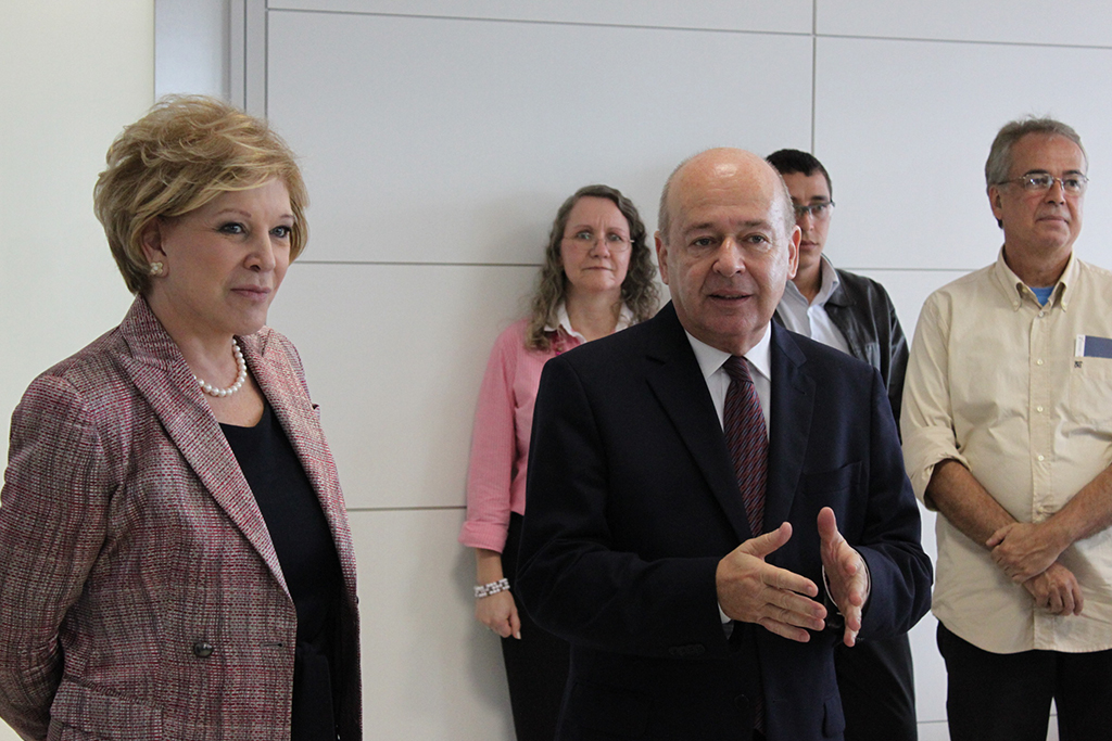 Brasília | Ministra visita o Instituto Brasileiro de Museus em virtude do decreto que regulamenta o Estatuto de Museus. 18.10.2013 Foto: ASCOM / IBRAM